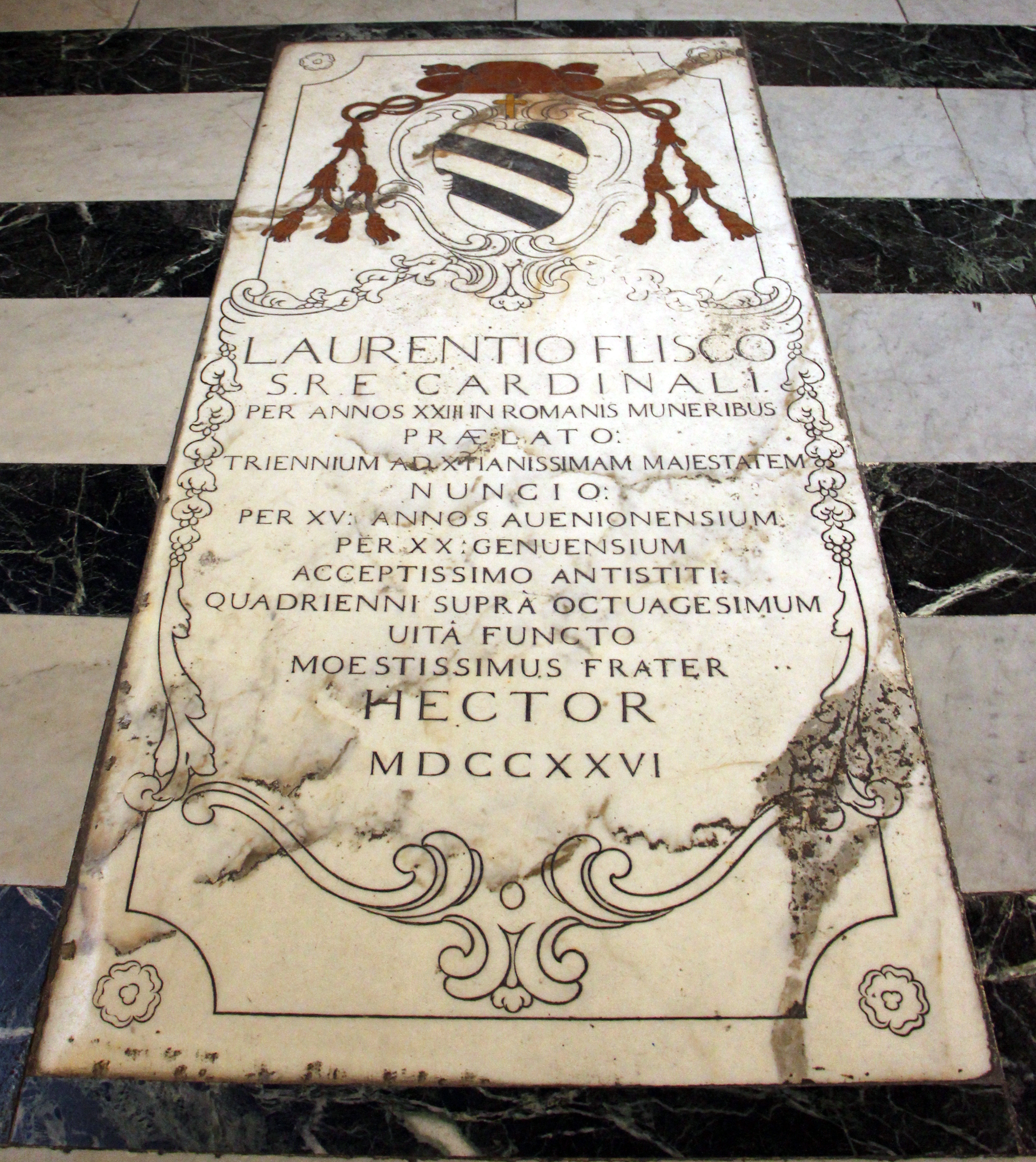 San Lorenzo (Genova)